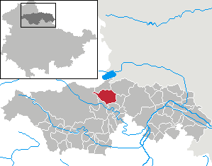 Bendeleben in Thuringia - Kyffhäuserkreis